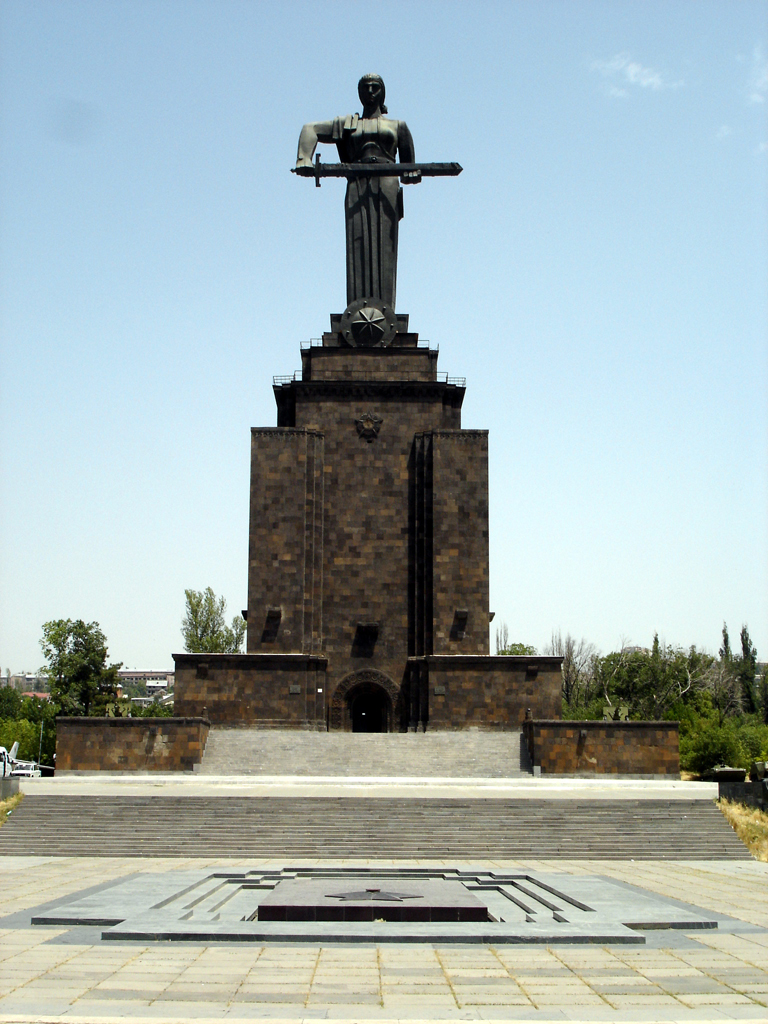 Erevan, la Mère Arménie